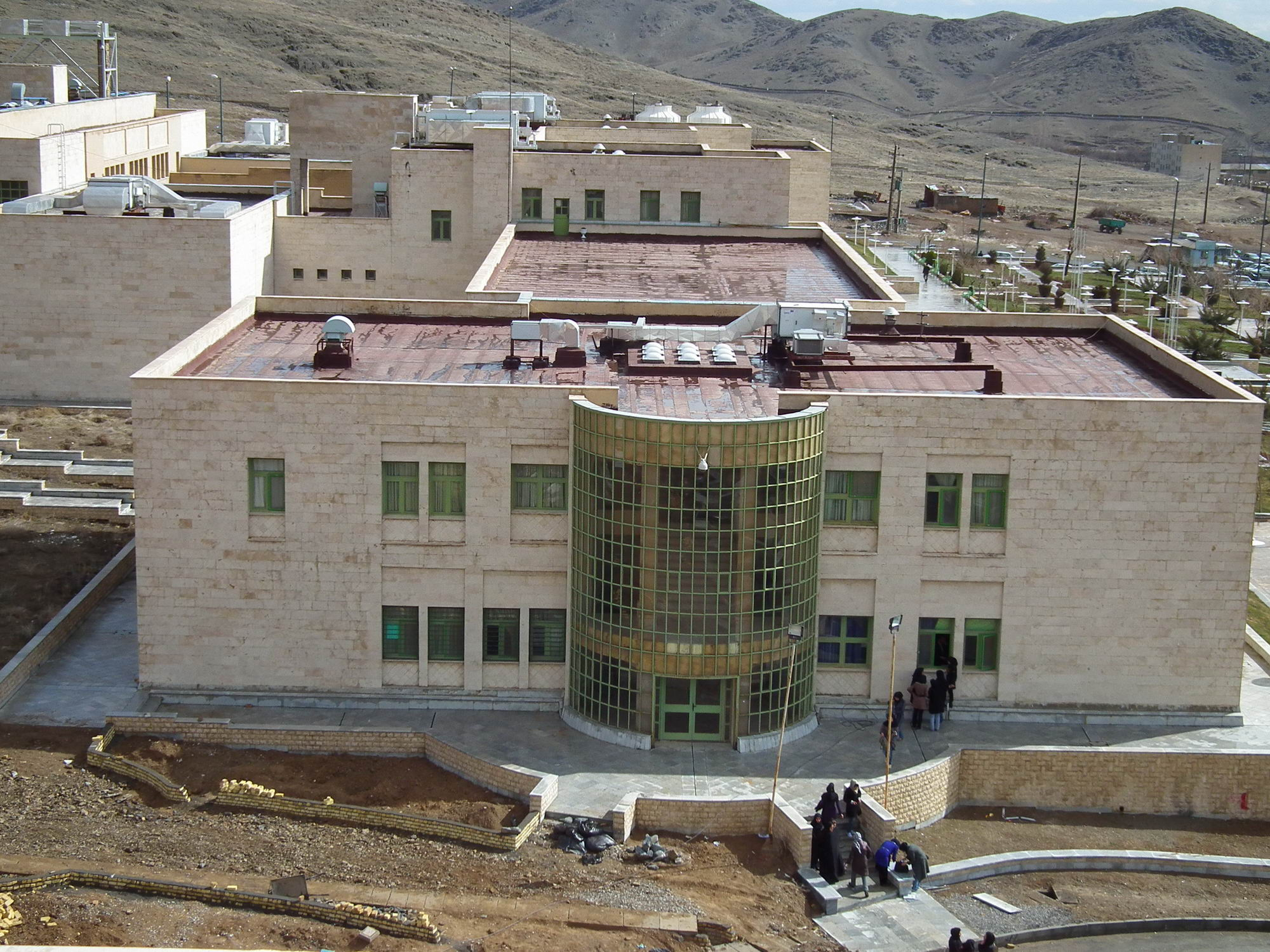 دانشکده علوم پایه دانشگاه اراک